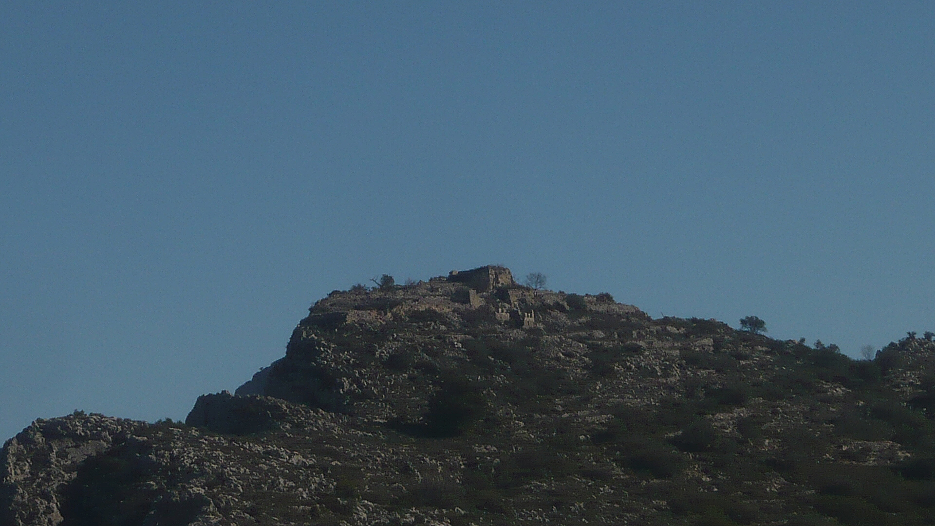 Castell de Tàrbena